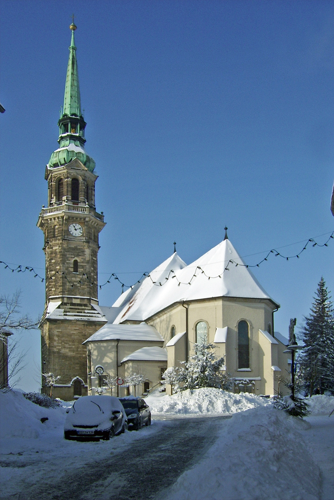 Radeberg luth. Kirche